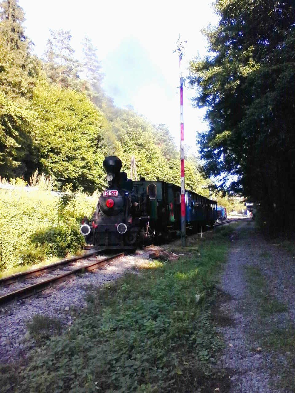 Vlak s parnou lokomotívou U 36.003 Katka odchádza z Čermeľa.